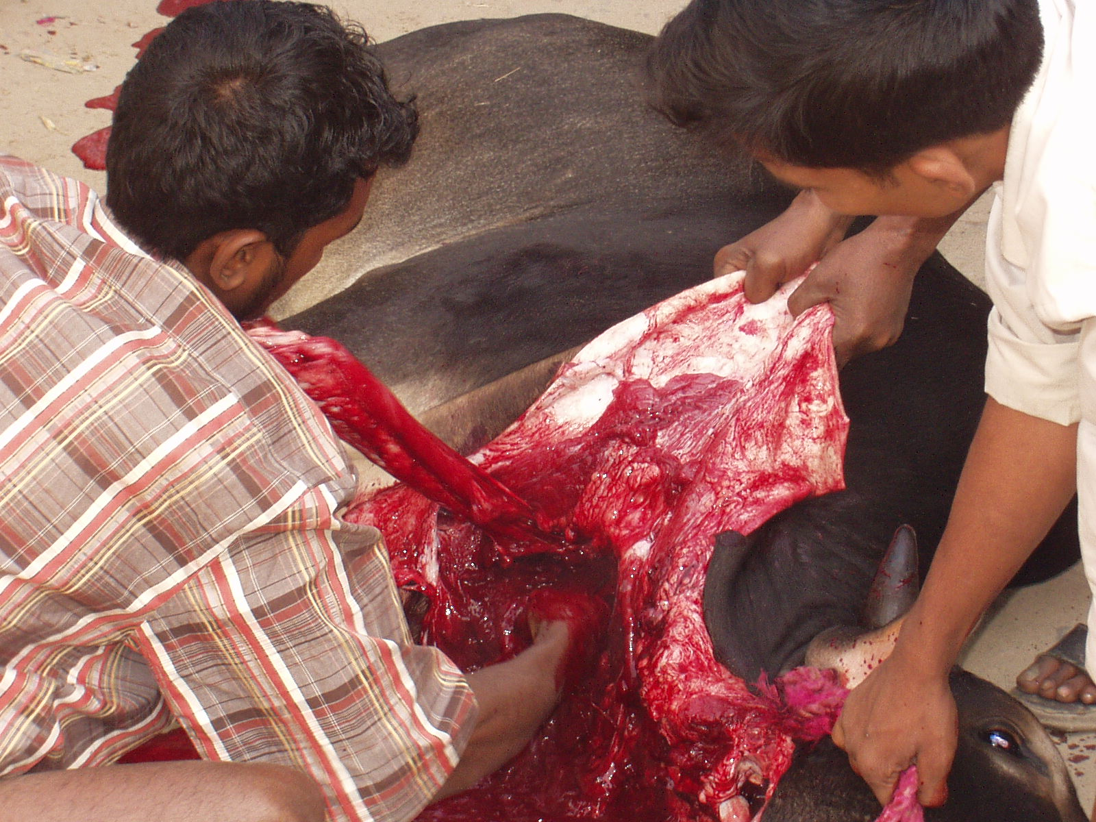 Slaughterin at Eid -ul -Azah. -mamun2a